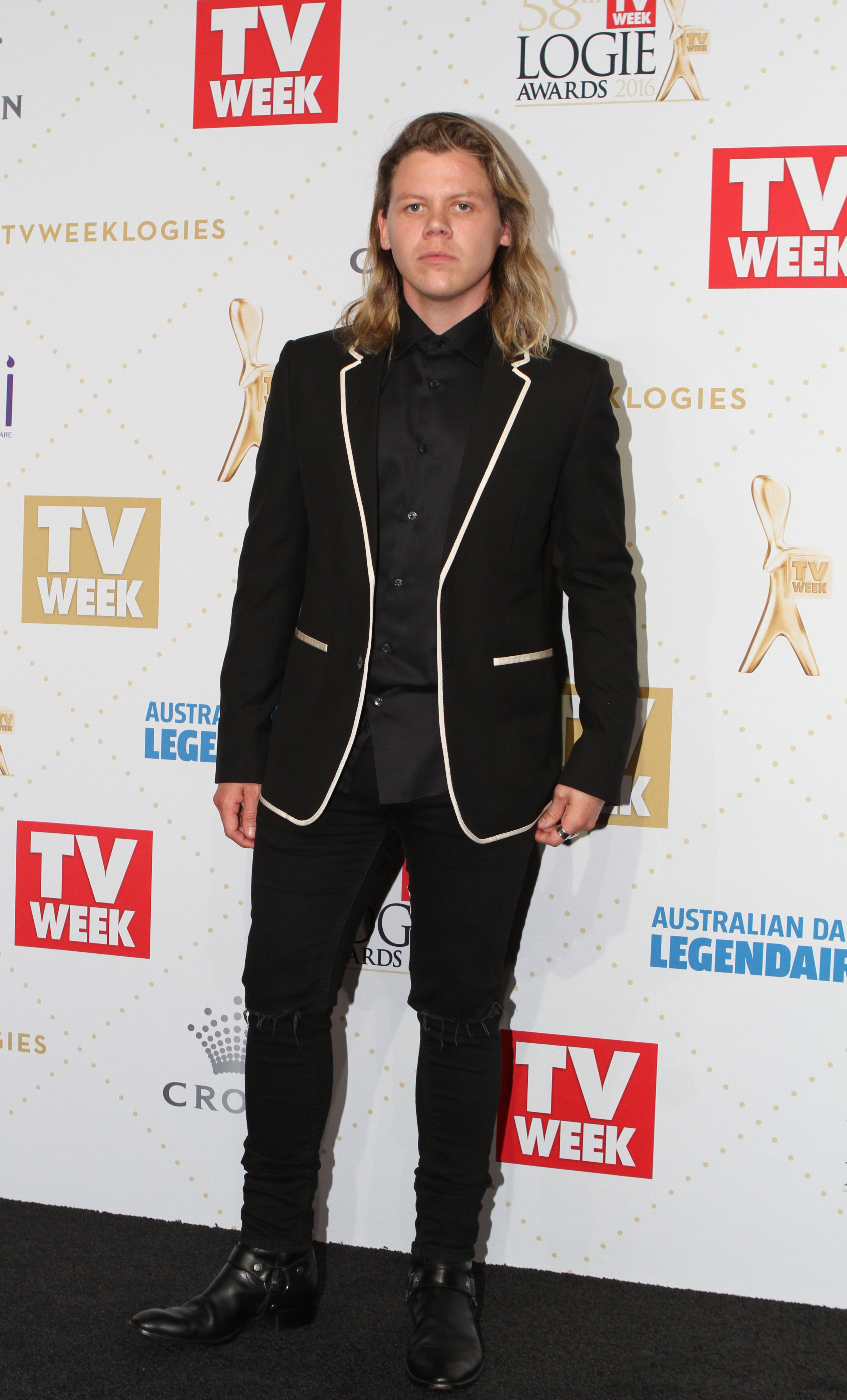 Conrad Sewell, 2016 TV Week Logie Awards